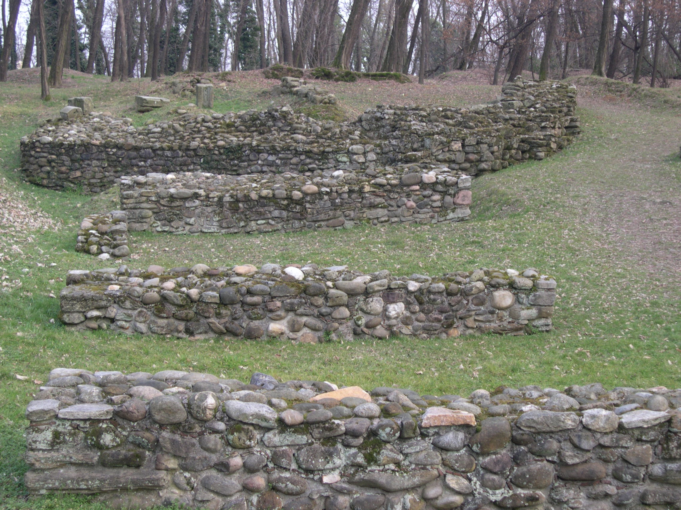 I ruderi del ponte e l'accesso al castrum di Castelseprio